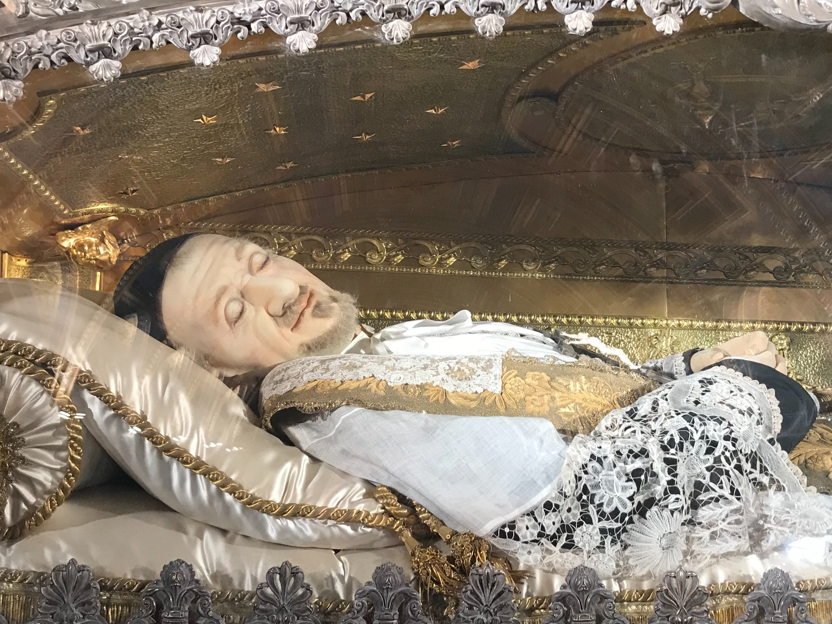 Relikwie św. Wincentego a Paulo w koście na Rue de Sevres